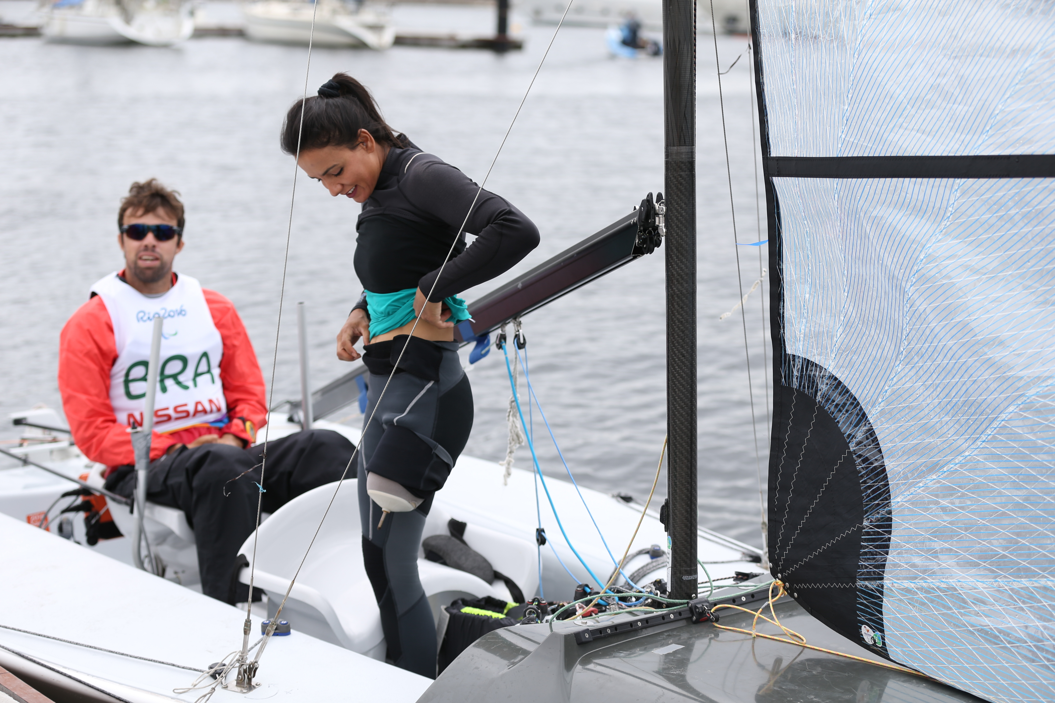 Rio de Janeiro - Bastidores da preparação para a competição de Vela, barco de quilha fixa para 3, 2 e 1 pessoa, das Paralimpíadas Rio 2016, na Marina da Glória (Tânia Rêgo/Agência Brasil)